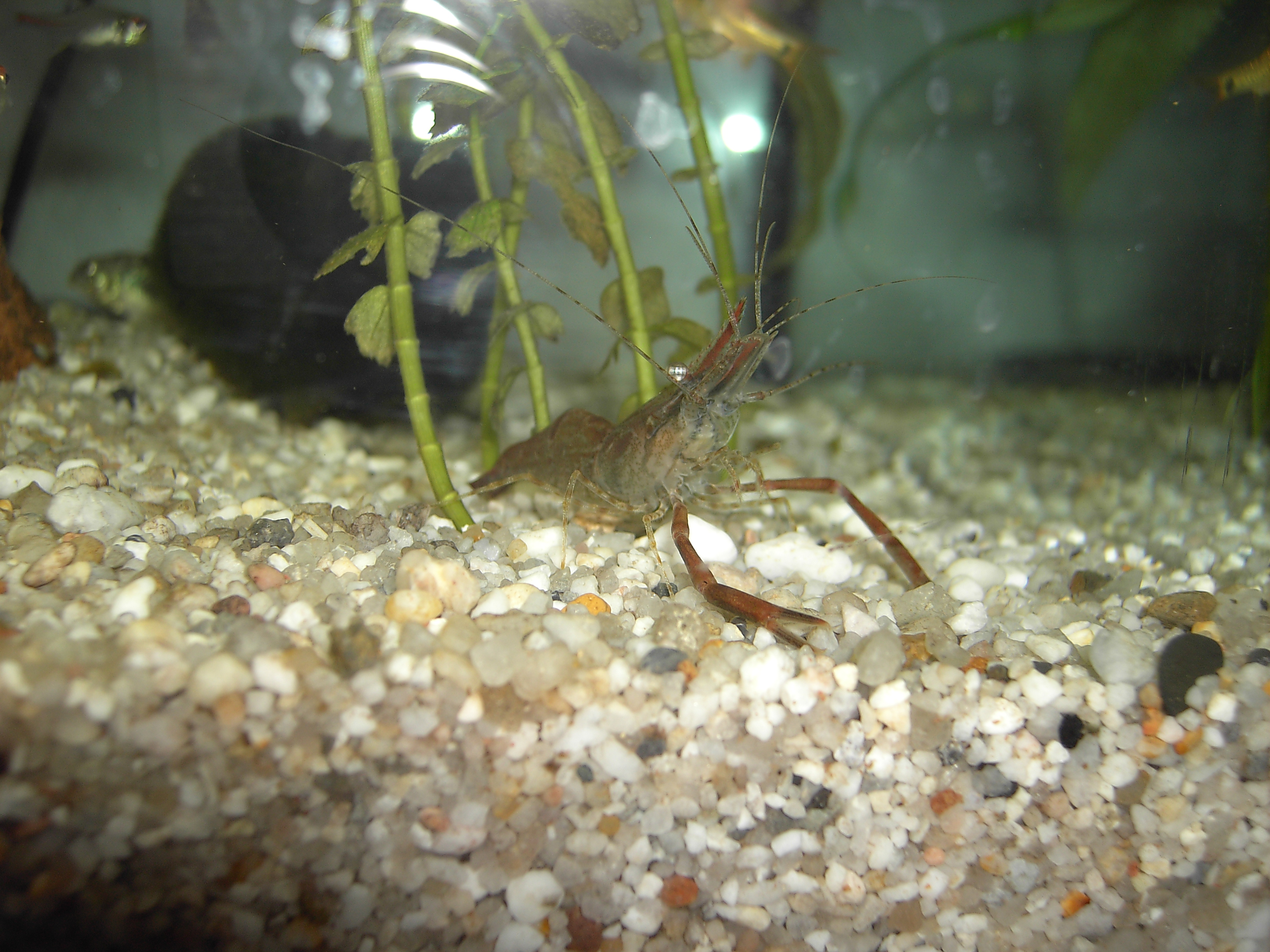 Macrobrachium assamense, male, nearly adult